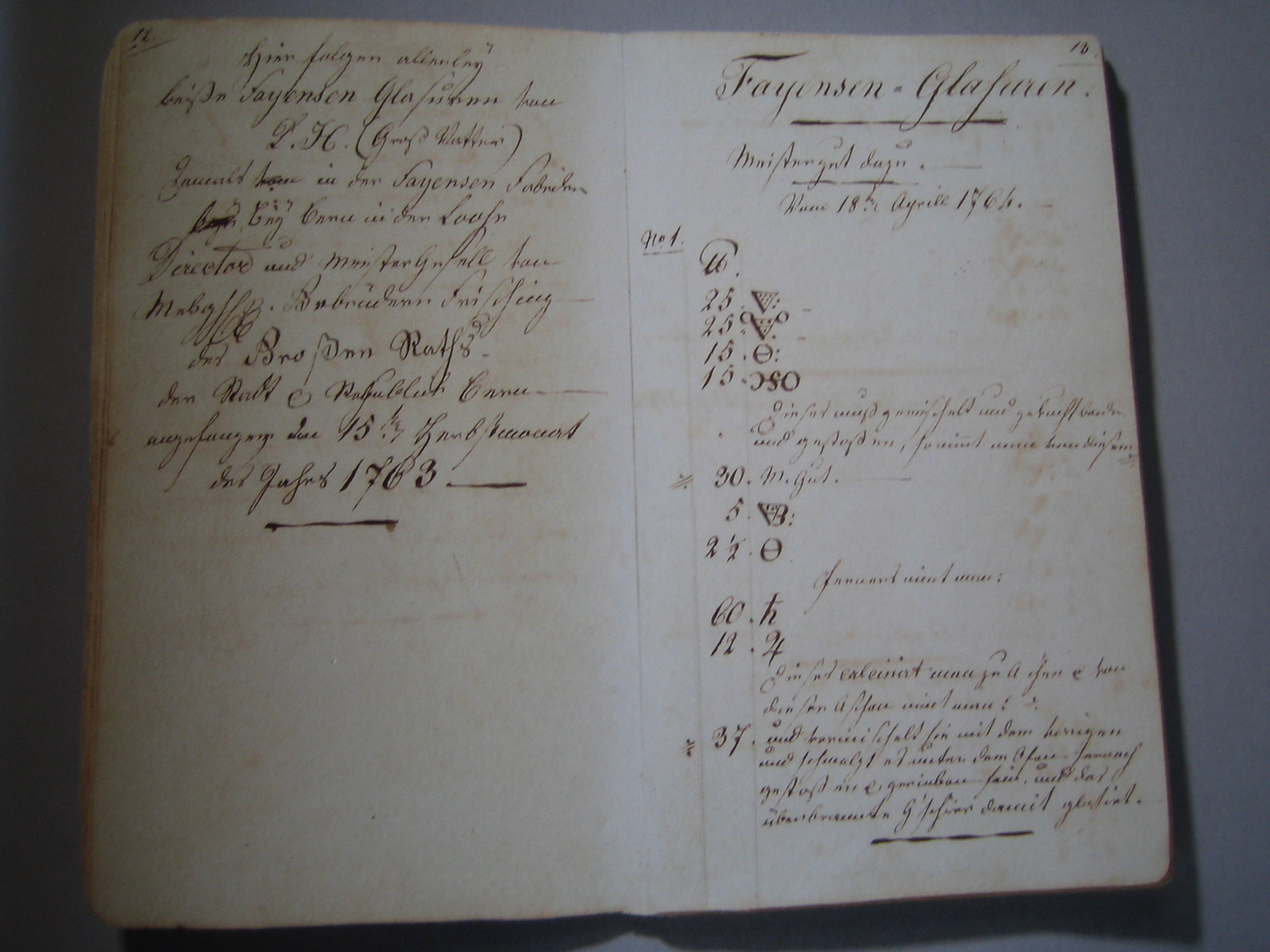 Rezeptbuch für Fayenceglasuren und Malfarben von Daniel Hermann aus der Zeit, als er für die Fayence-Manufaktur Frisching gearbeitet hat (Abschrift um 1861 seines gleichnamigen Enkels)